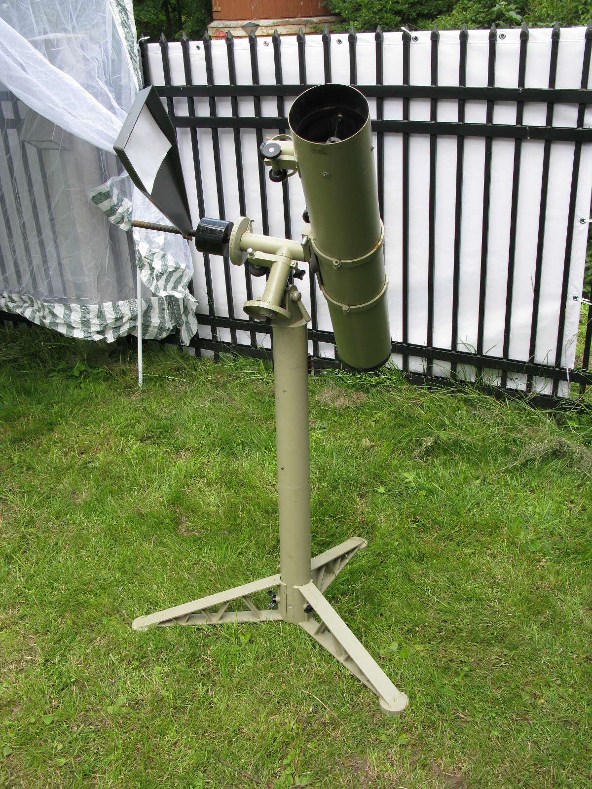 Teleskoop Tartu Tähetorni juures Tartu hansapäevade Teaduslinnas, 20. juuli 2012. Foto: Oop.